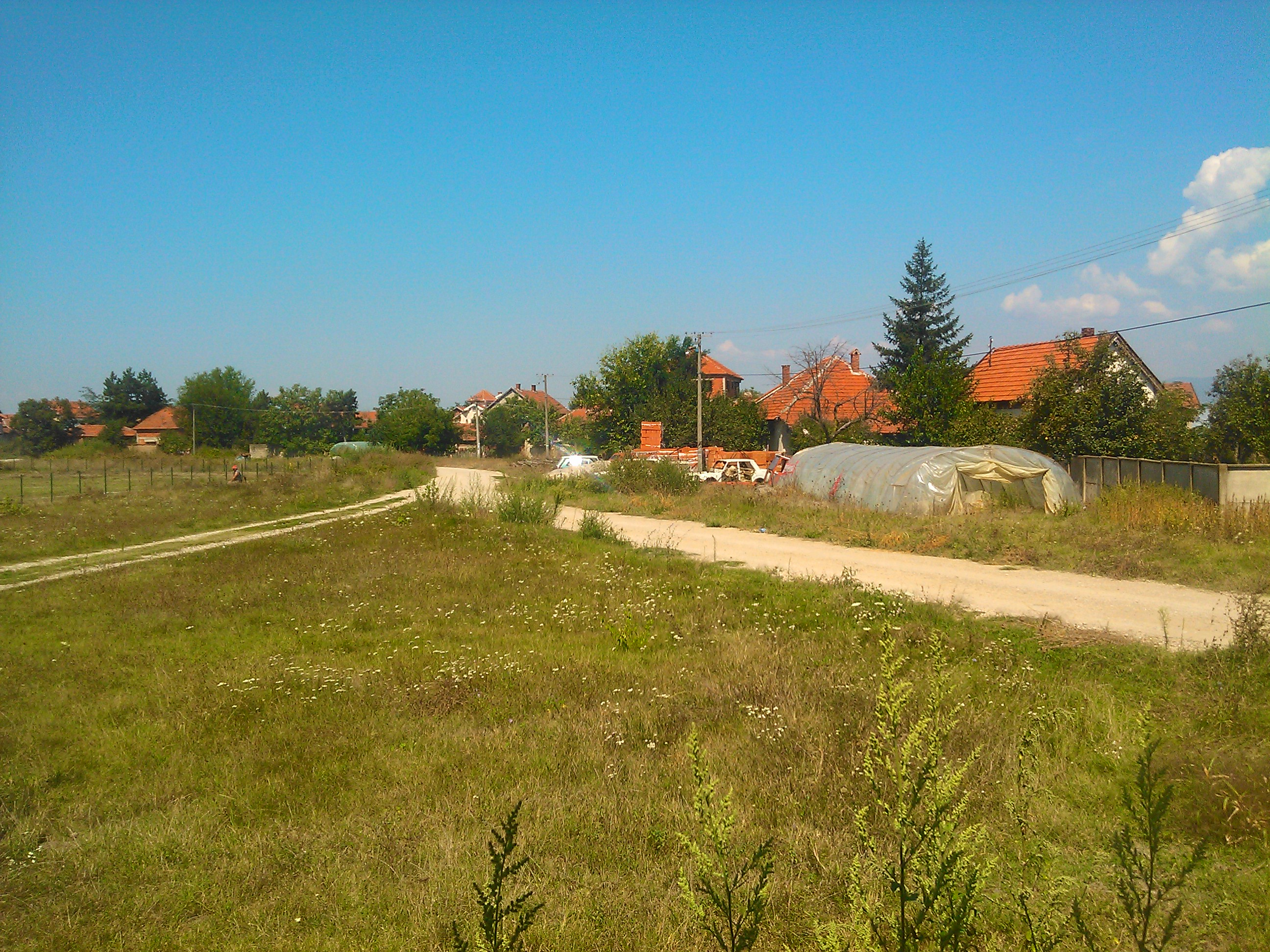 Srpski (latinica): Selo Žižavica